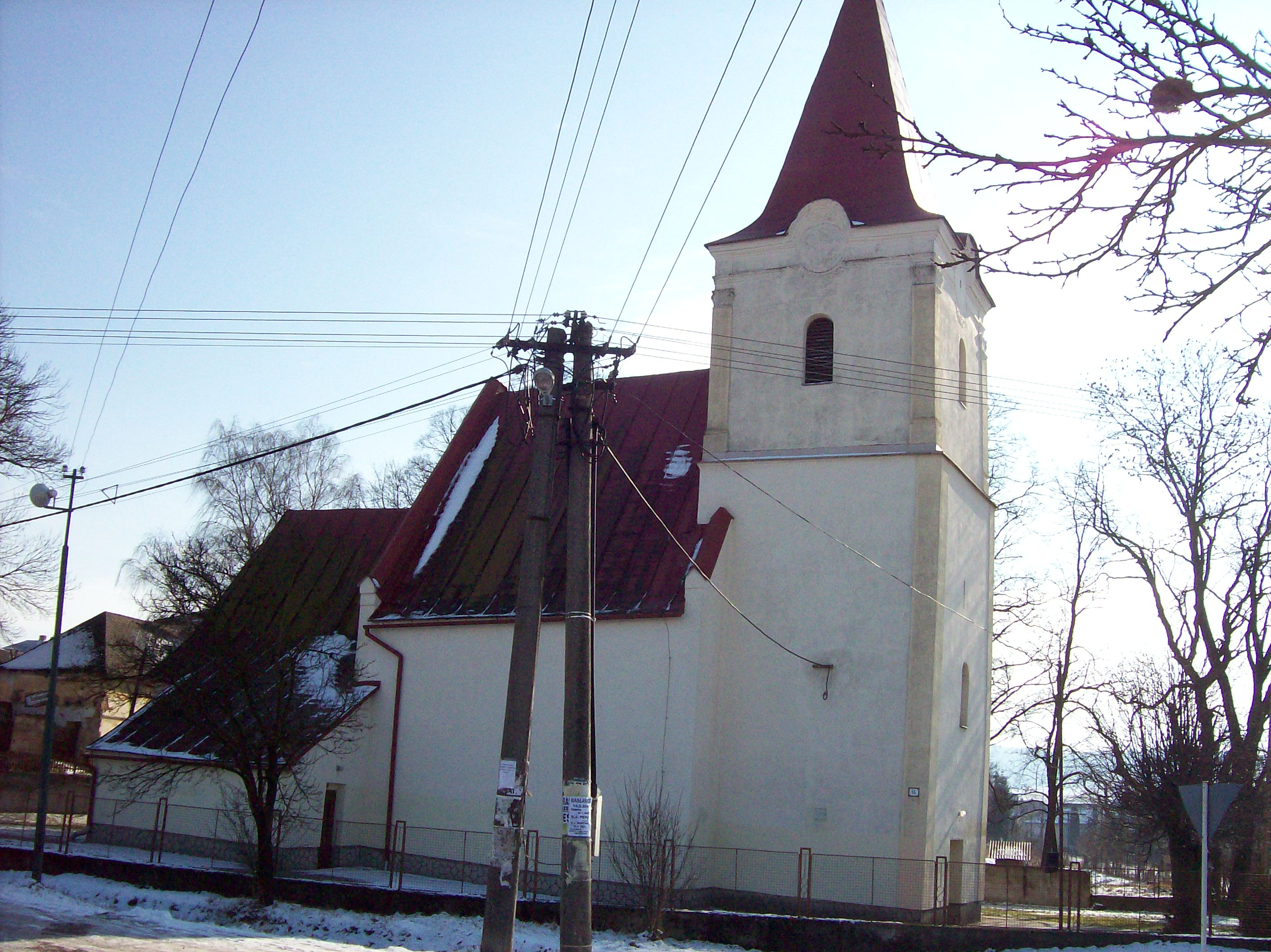 Evanjelický kostol, Raslavice, okres Bardejov